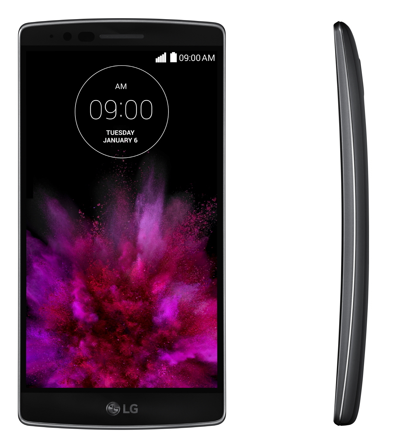 LG전자, CES 2015서 ‘LG G 플렉스2’ 첫 공개 “커브드 스마트폰의 진화” ■ 최적의 사용환경 갖춘 커브드 스마트폰 □ 5.5인치 풀HD 플라스틱 OLED 디스플레이 탑재 □ 스마트폰 전면과 후면 각기 다른 최적의 곡률 적용 □ 이달 한국 출시를 시작으로 순차적으로 글로벌 시장 공략 ■ 고성능 하드웨어 □ 퀄컴 스냅드래곤 810, 64비트 옥타코어 칩셋 탑재 □ ‘3밴드 LTE-A’ 지원, 1GB 영화 한편을 27초 만에 다운로드 □ 18배 빨라진 셀프 힐링 기능, 10초 만에 스크래치 복원 ■ 한 층 강화된 사용자 경험(UX) □ 셀카 찍고 바로 확인 가능한 ‘제스처 뷰’ □ 꺼진화면에서 터치만으로 주요정보를 확인 가능한 ‘글랜스 뷰’ □ 40분 안에 절반 충전 가능한 ‘고속 충전 기능’ ※ Social LG전자 ( 에서 관련 보도자료를 확인하실 수 있습니다.